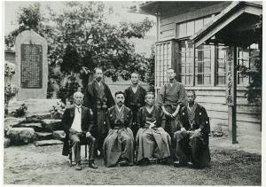 愛知県碧海郡刈谷町の刈谷町立刈谷図書館。1917年の開館当初。後列左から井野直治、三宅史、森銑三。前列左から高須鉈吉（初代館長）、宍戸俊治、藤井清七、岡本廣太郎。